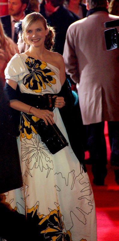 Isabelle Carré à la cérémonie des Césars 2008